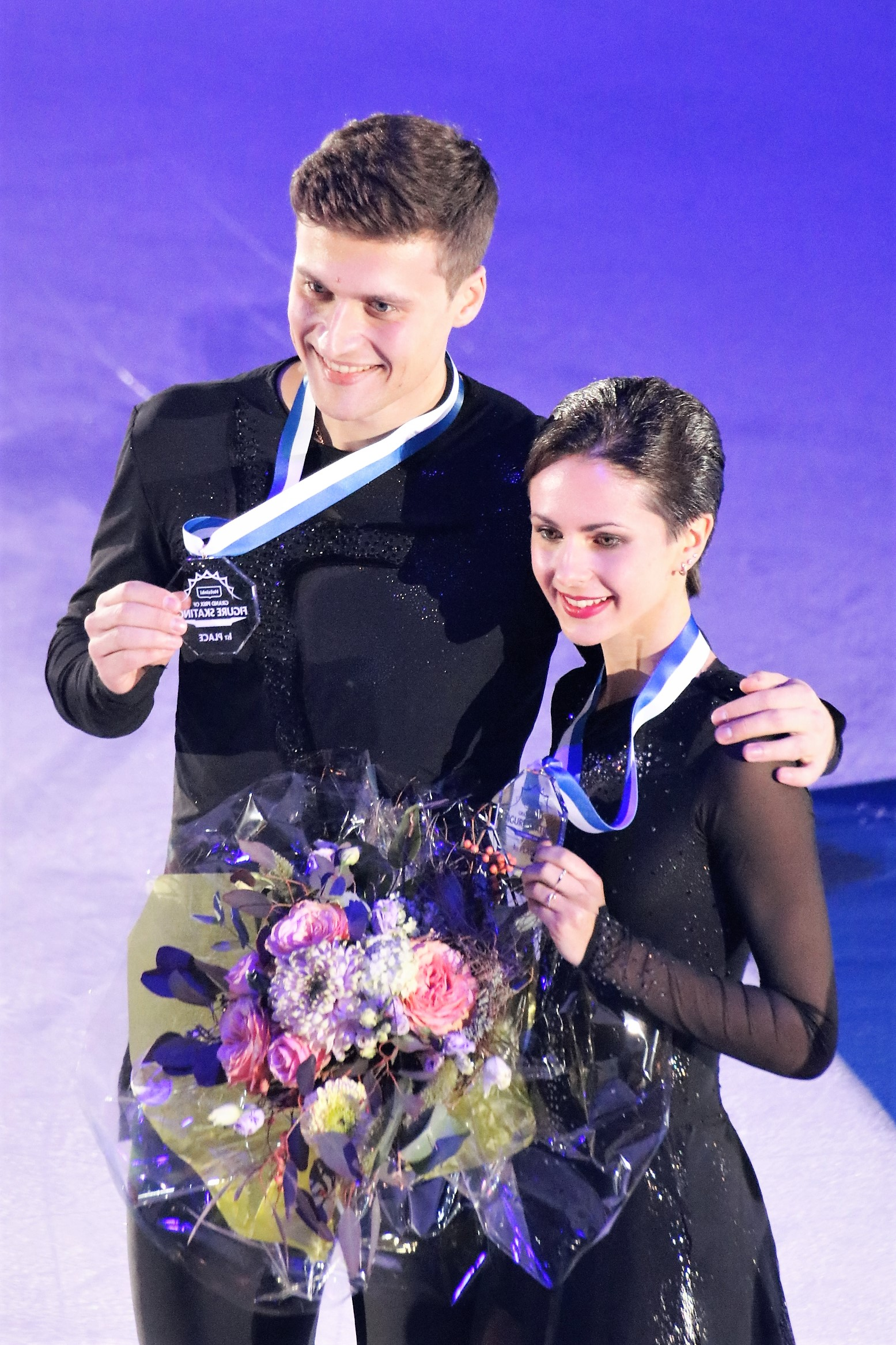 Наталья Забияко / Александр Энберт (Россия) на церемонии награждения Гран-при Хельсинки 2018.